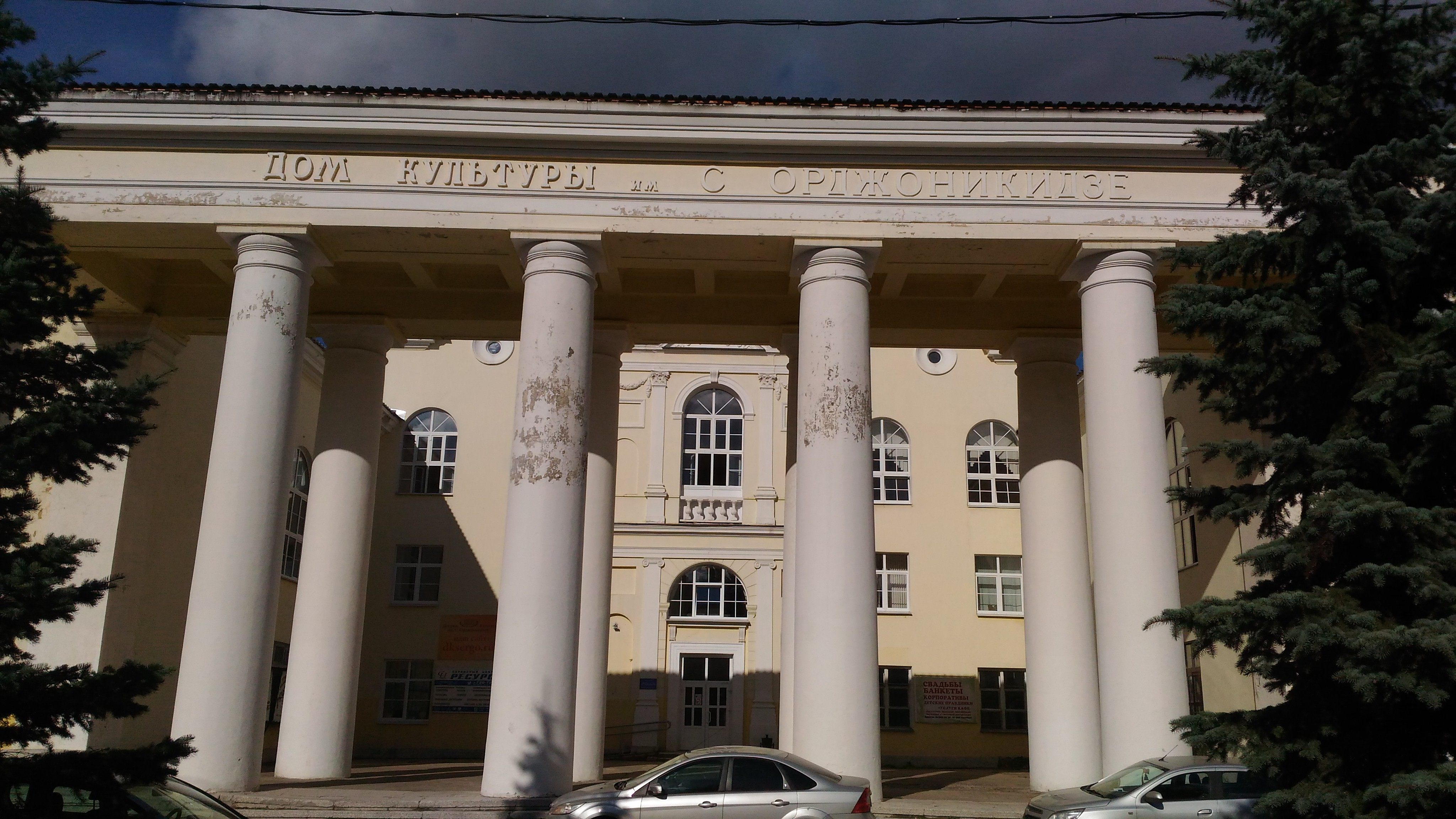 Нижний Новгород. Дом культуры имени Серго Орждоникидзе